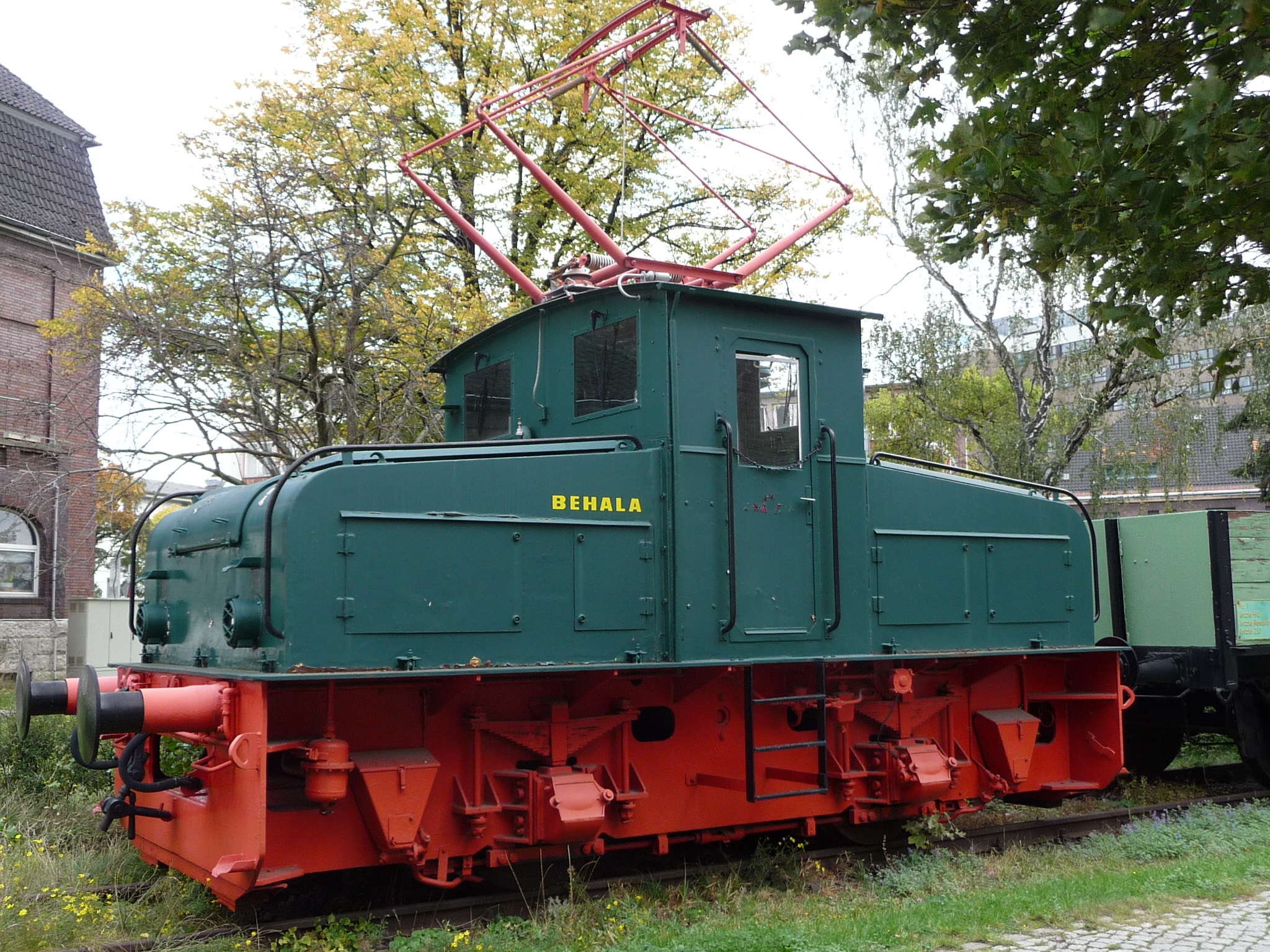 Der Westhafen in Berlin Moabit ist der größte Hafen der Stadt. Nach ersten Planungen aus dem Jahr 1900 wurde 1914 mit dem Bau begonnen. 1923 wurde die BEHALA als Betreiber gegründet, welche im gleichen Jahr den ersten Teil in Betrieb nahm. Nach dem Zweiten Weltkrieg waren 60 % der Hafenanlagen zerstört. Bis 1950 wurden die Schäden beseitigt und der Westhafen anschließend für den Umschlag zwischen Binnenschiff, Eisenbahn und Lastwagen weiter ausgebaut. Bis zur Wiedervereinigung Berlins dienten die Anlagen auch der für Krisenzeiten angelegten Senatsreserve.